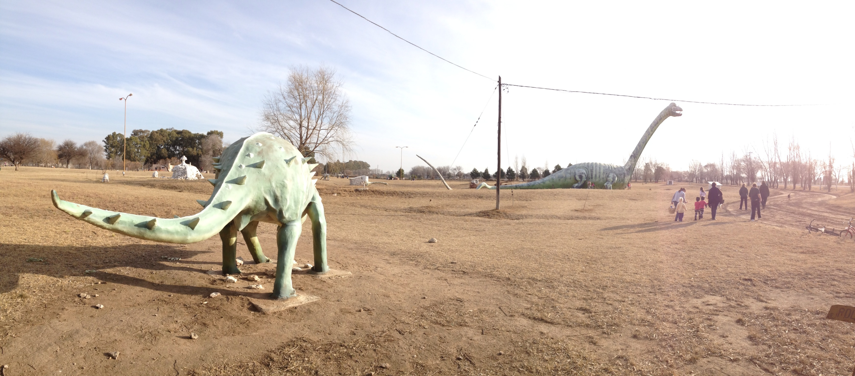 Parque de los Dinosaurios, Eduardo Castex, La Pampa